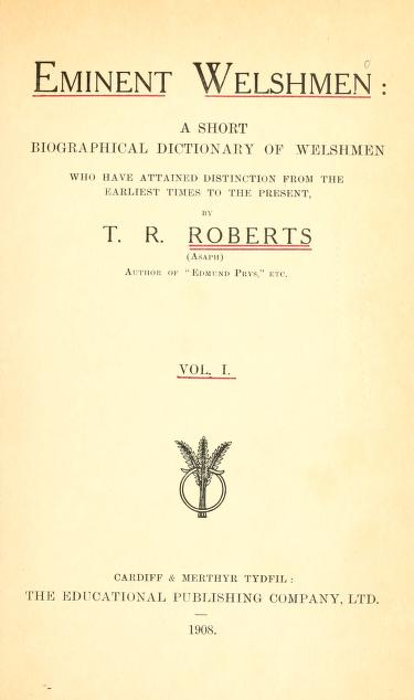 Tudalen blaen "Eminent Welshmen 1908"